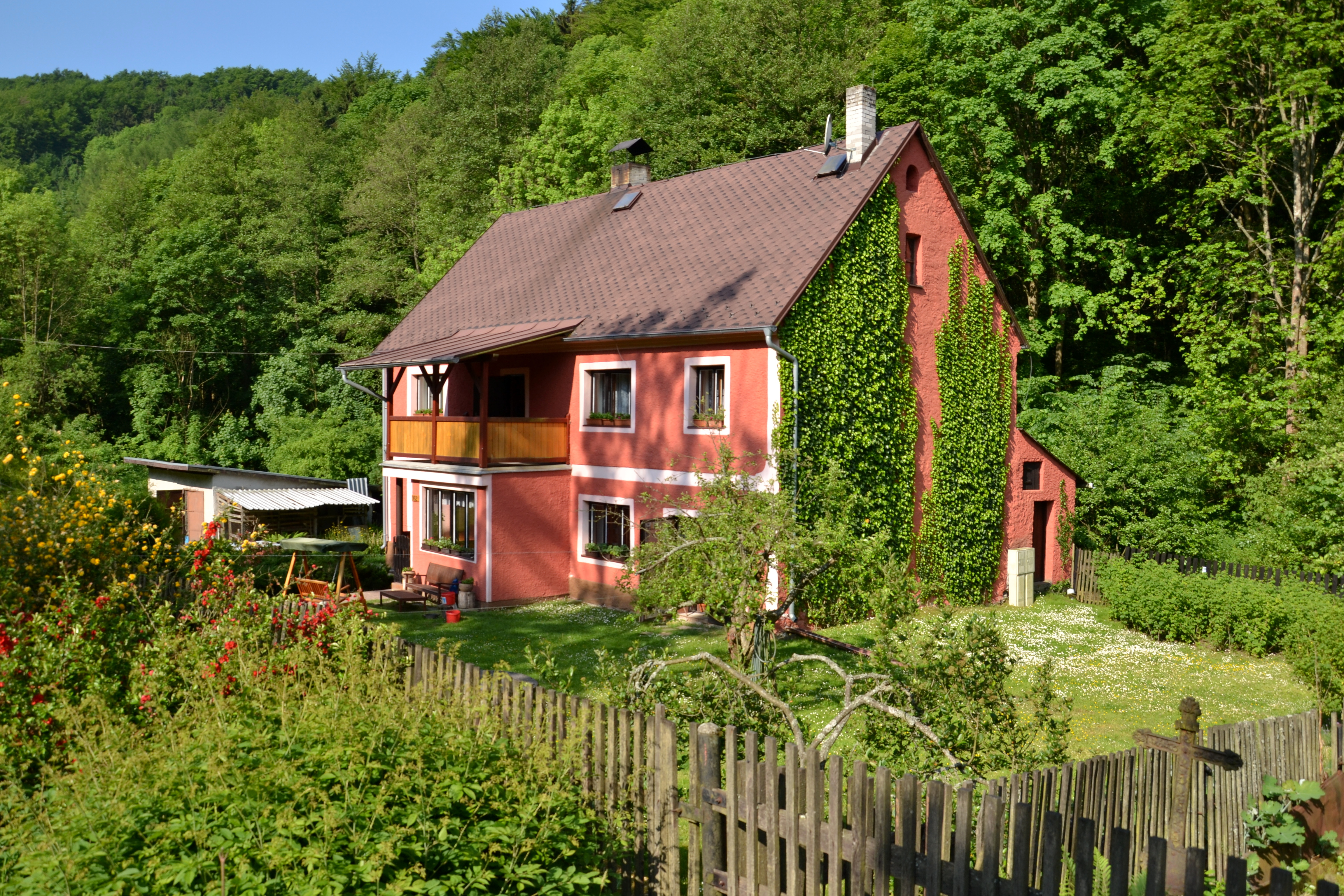 Dům čp. 162 na jižním okraji osady